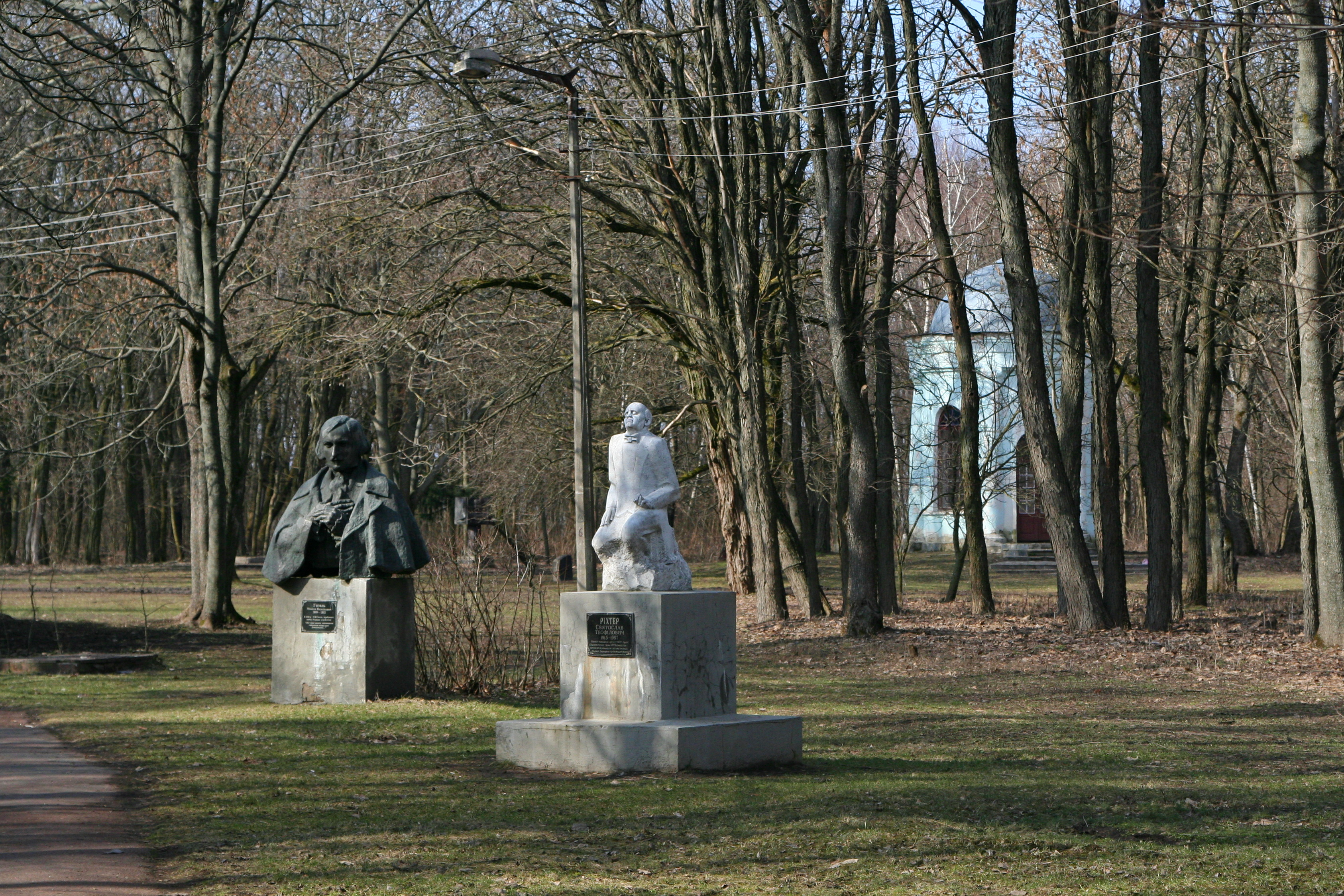 Парк-пам'ятка садово-паркового мистецтва (120 га), Яготин